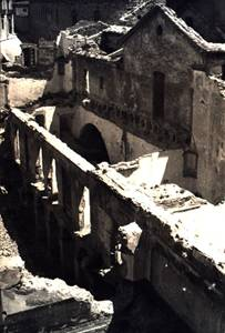 Foto tambè feta pel meu rebesavi de l'enderrocament de l'escola Sagrat Cor de Jesús.